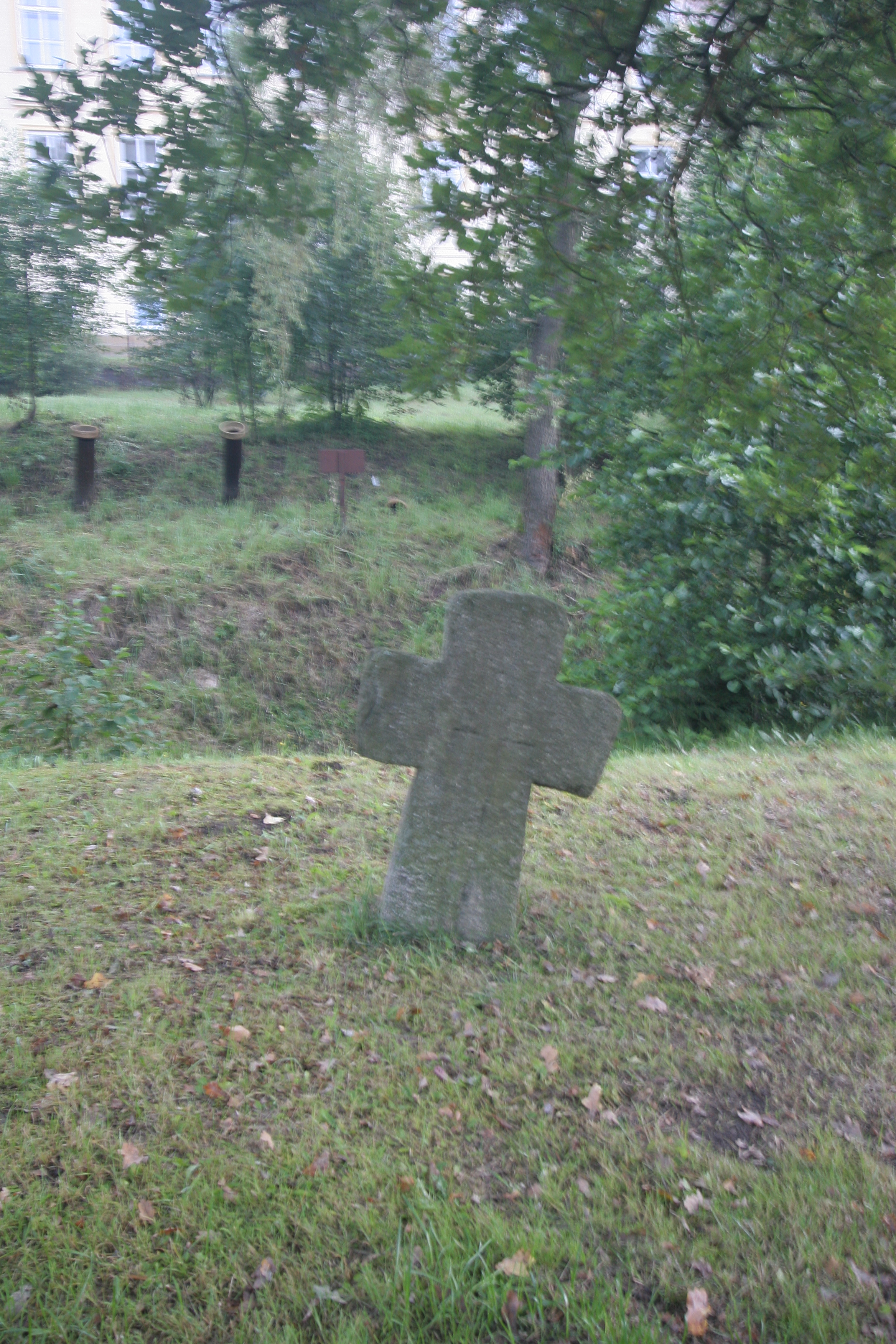 Smírčí kříž, mezi silnicí a potokem, Lampertice.